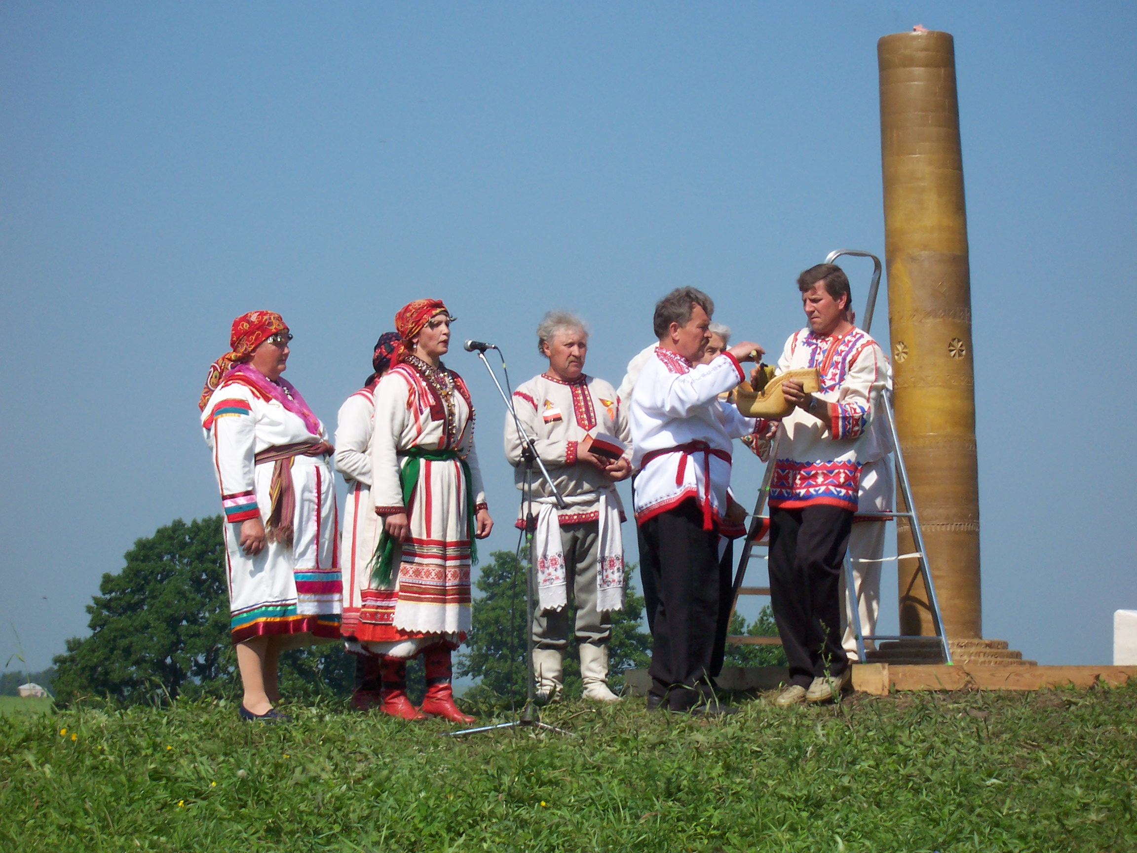 Раськень Озкс, зажигание Родовой свечи